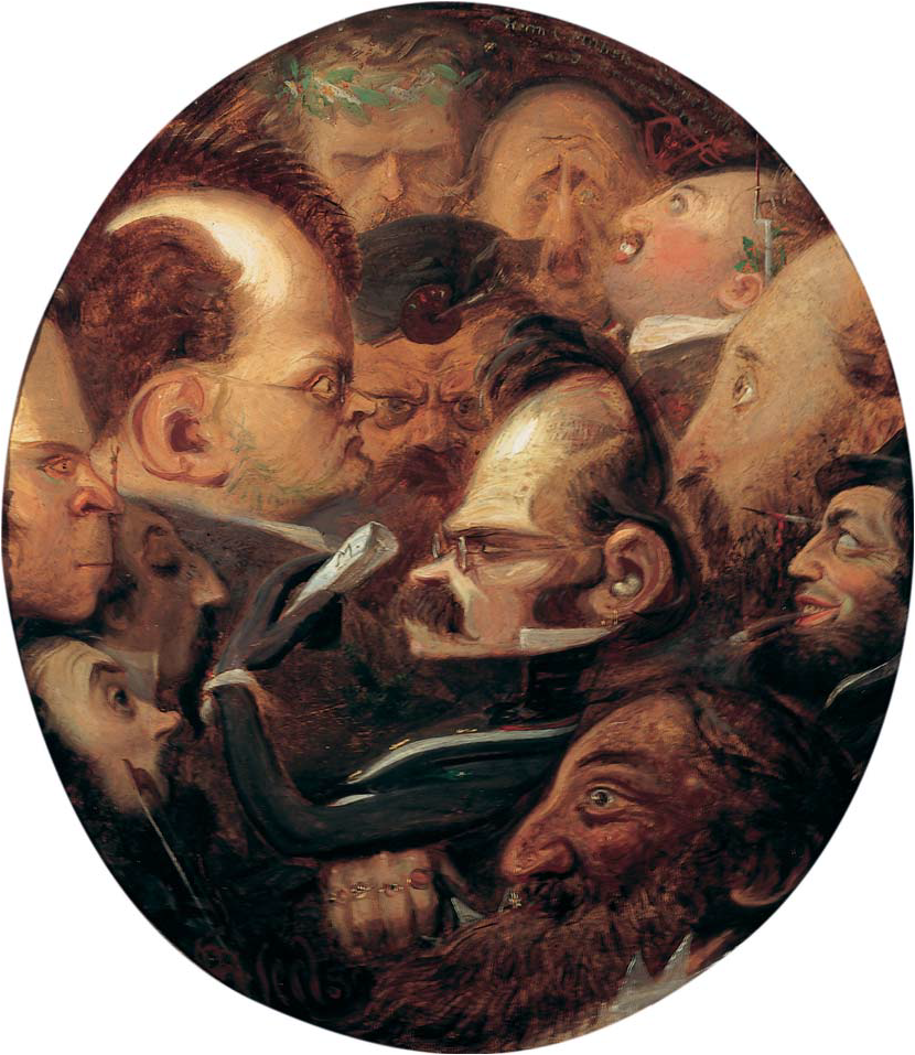 Johann Richard Seel, Bildniskarikaturen, u. a. Carl Siebel (1836), Emil Rittershaus (1834–1857) und Carl Michels (1831–1866), 1859, Öl auf Pappe, von der Heydt-Museum